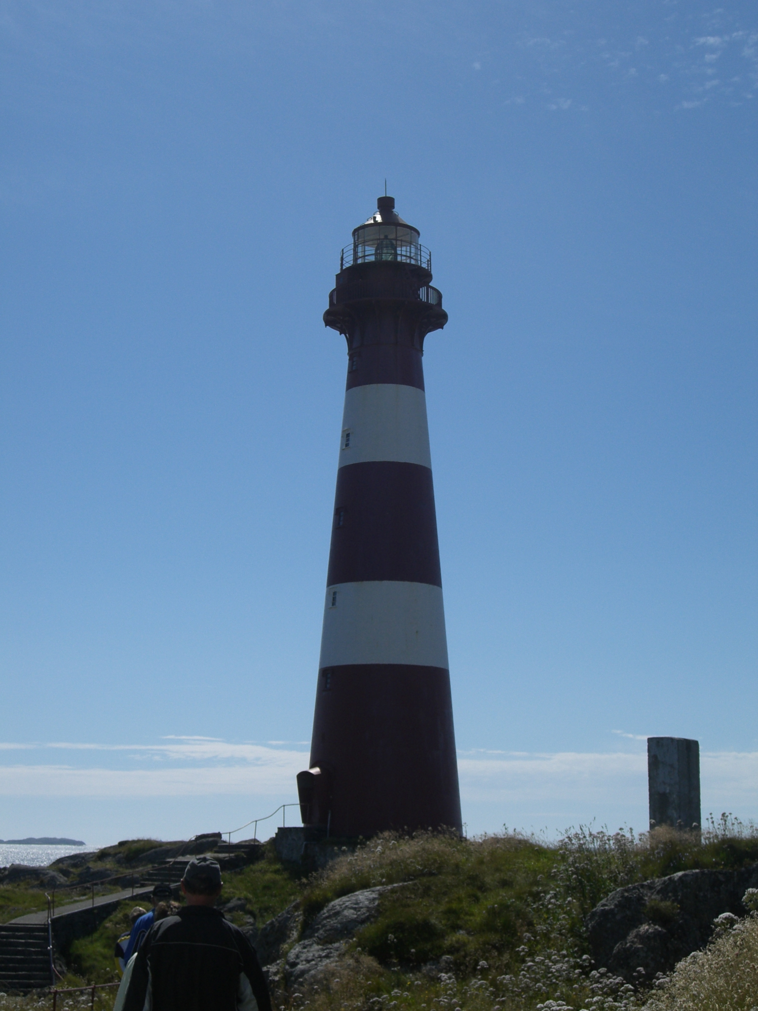 Hellisøy fyr på Fedje. (Hellisøy lighthouse at Fedje in western Norway)